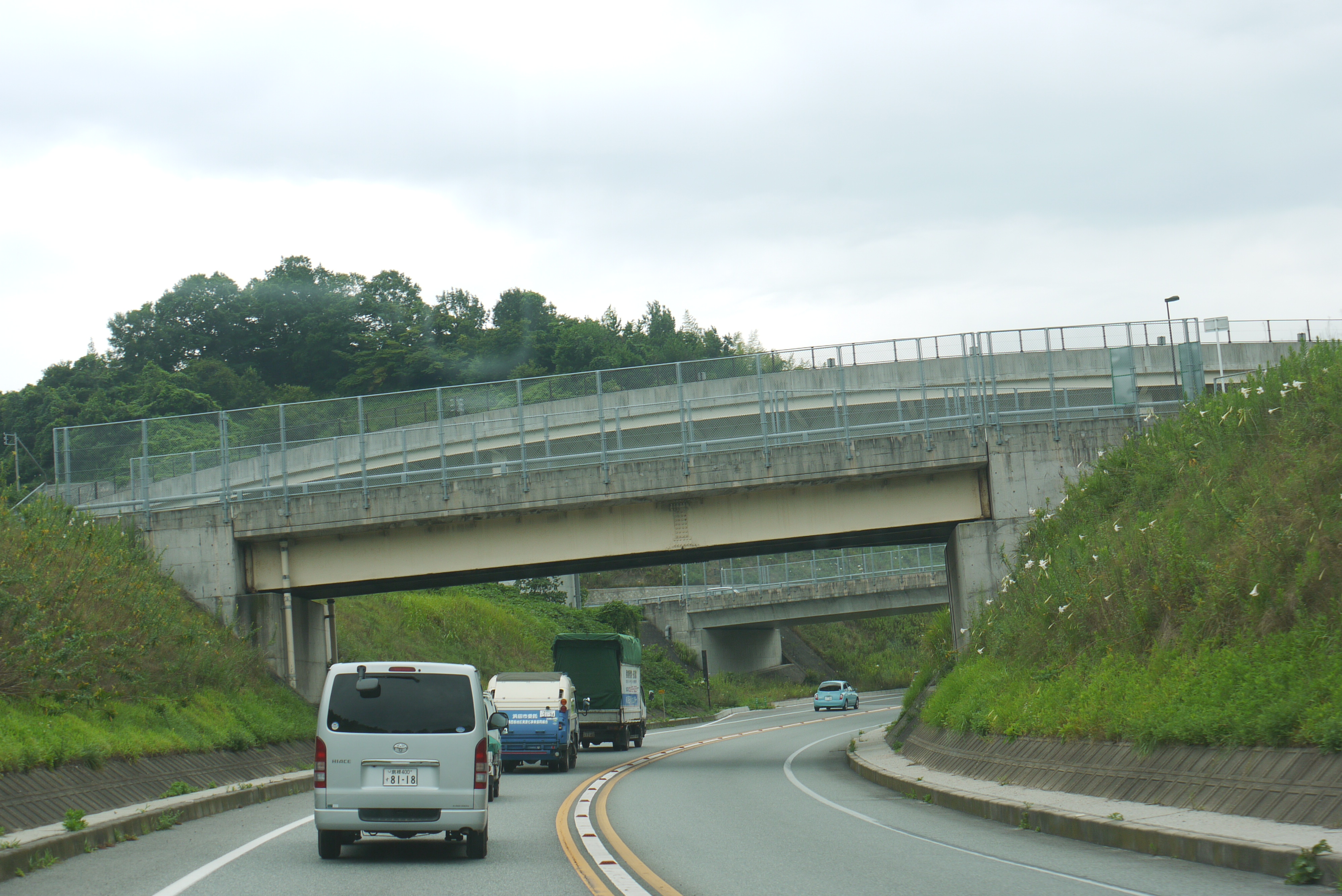 2009年8月21日の浜田道路(浜田IC)